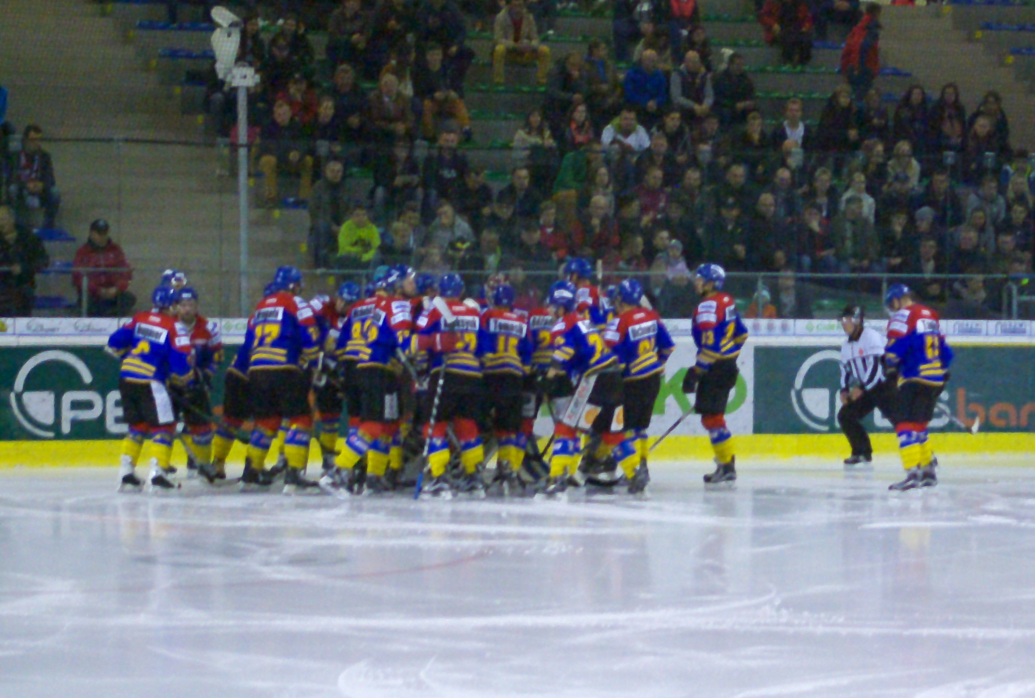 Mecz STS Sanok - Podhale Nowy Targ 1:4 (Arena Sanok, 23 października 2015).